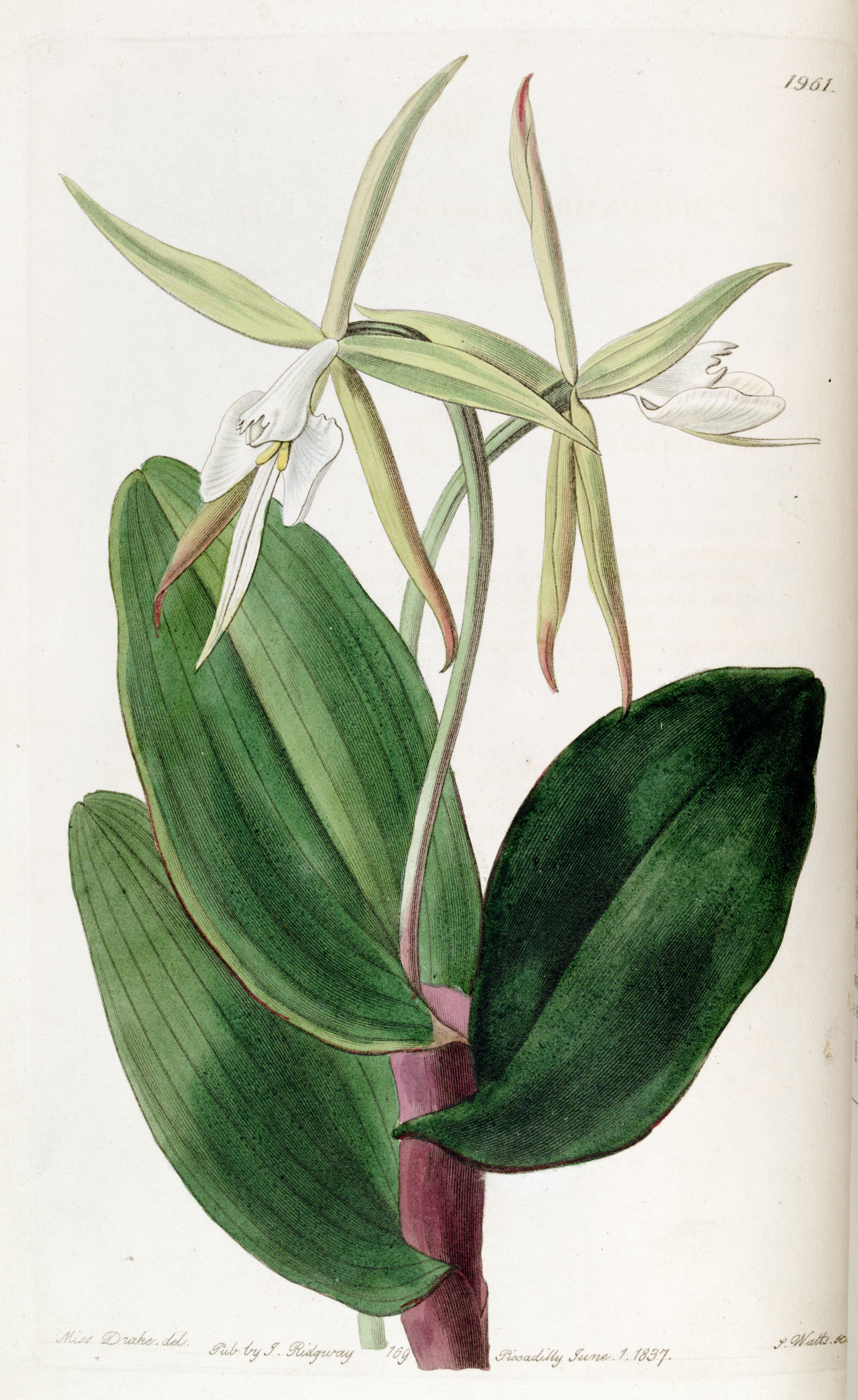 Epidendrum nocturnum